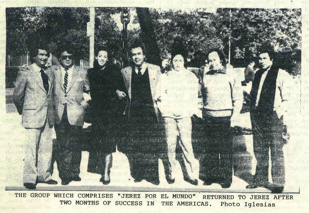 foto del grupo artístico "Jerez por el mundo", dirigido por Manuel Morao.